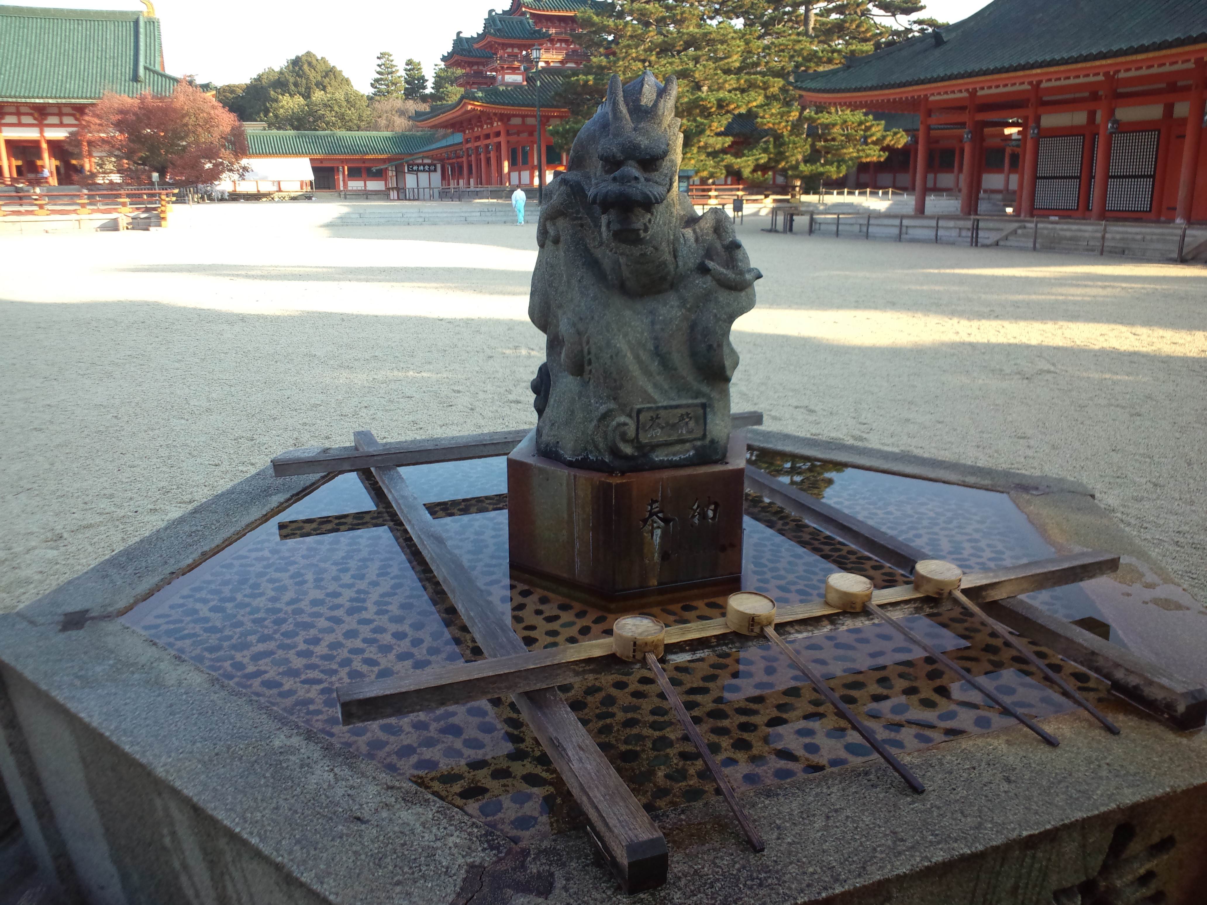 平安神宮 蒼龍の石像